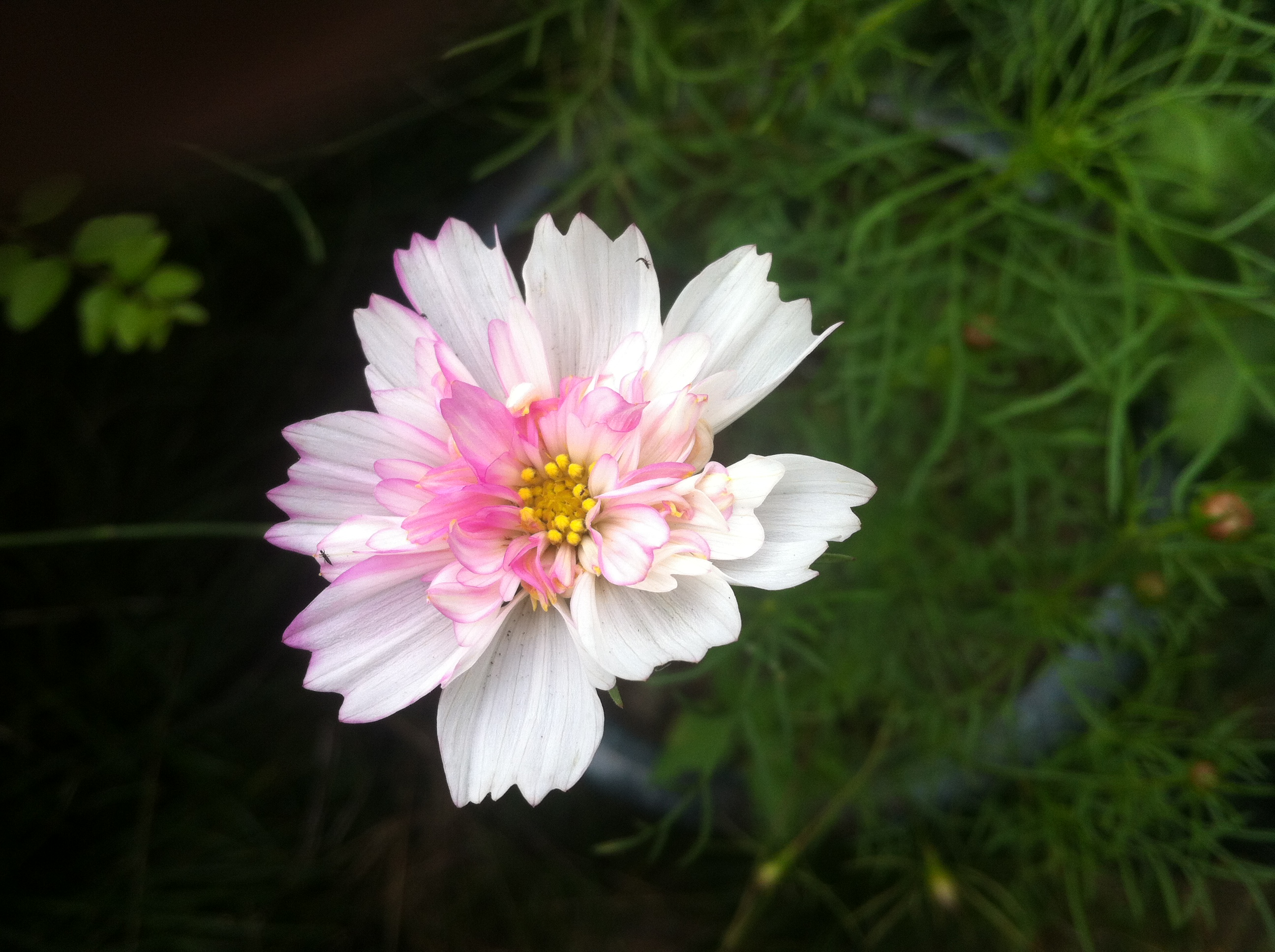 重瓣波斯菊